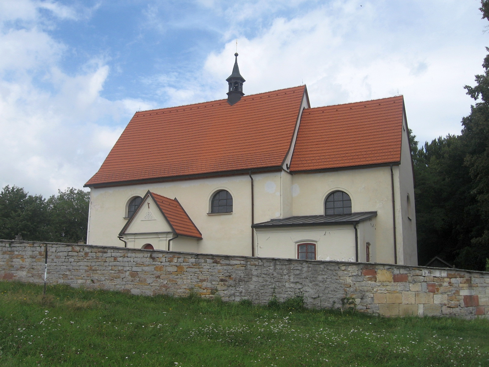 Kostel Navštívení P. Marie (Boušín)